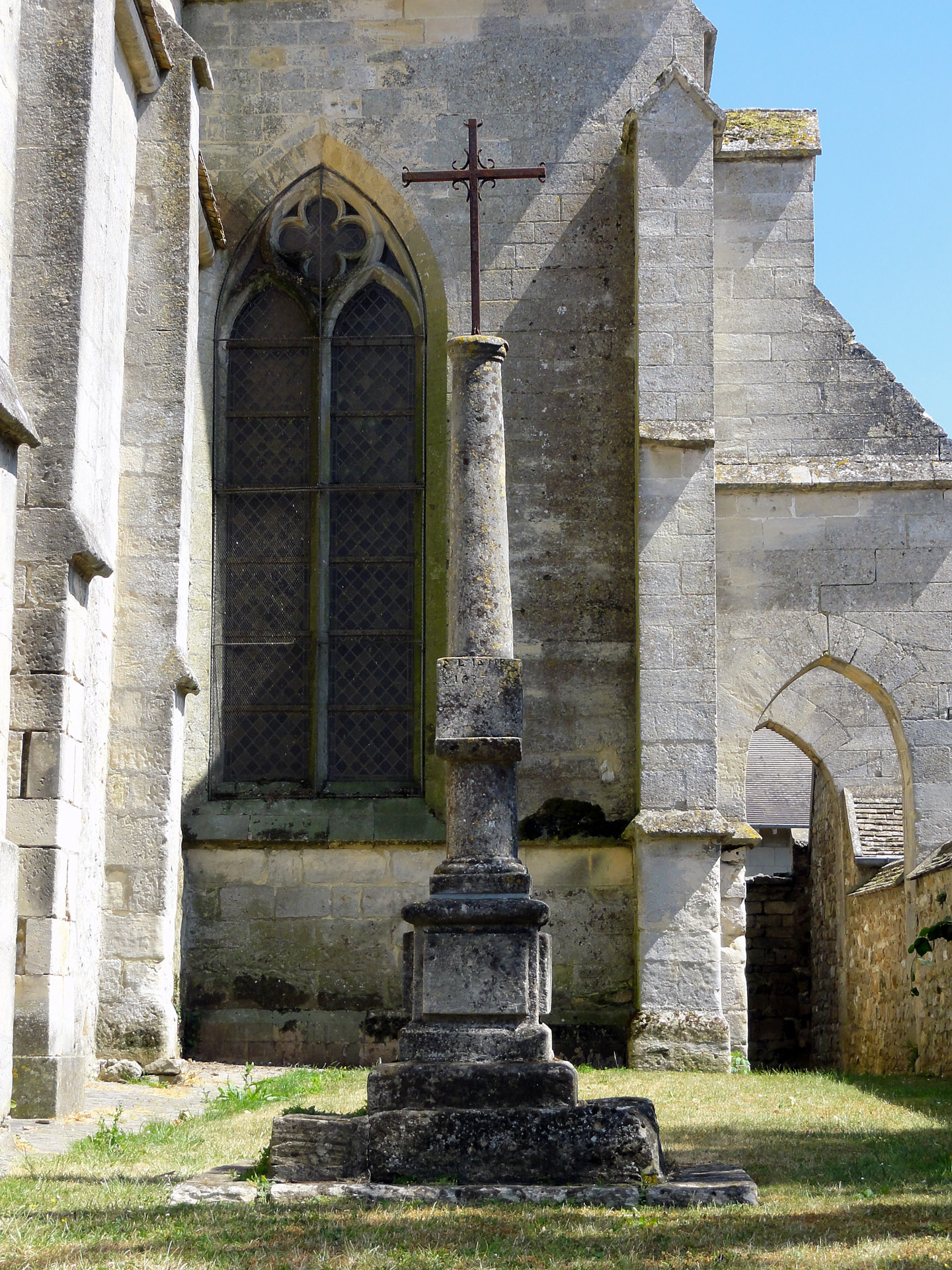 Calvaire devant l'église, Le Bellay-en-Vexin, France.